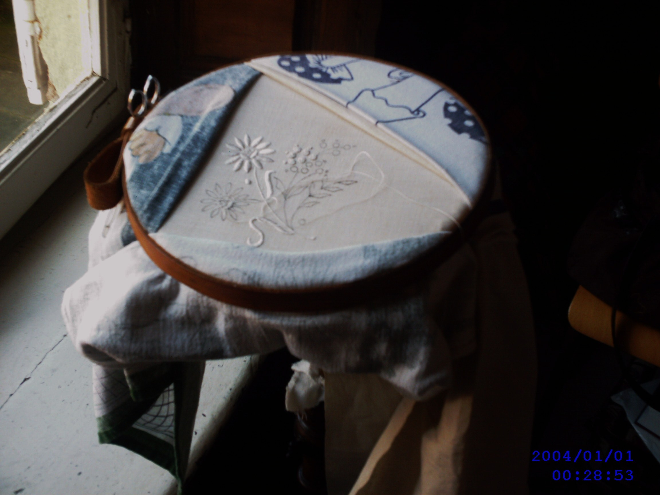 Métier à broder, dit "un rond", noter les ciseaux dans la sangle.